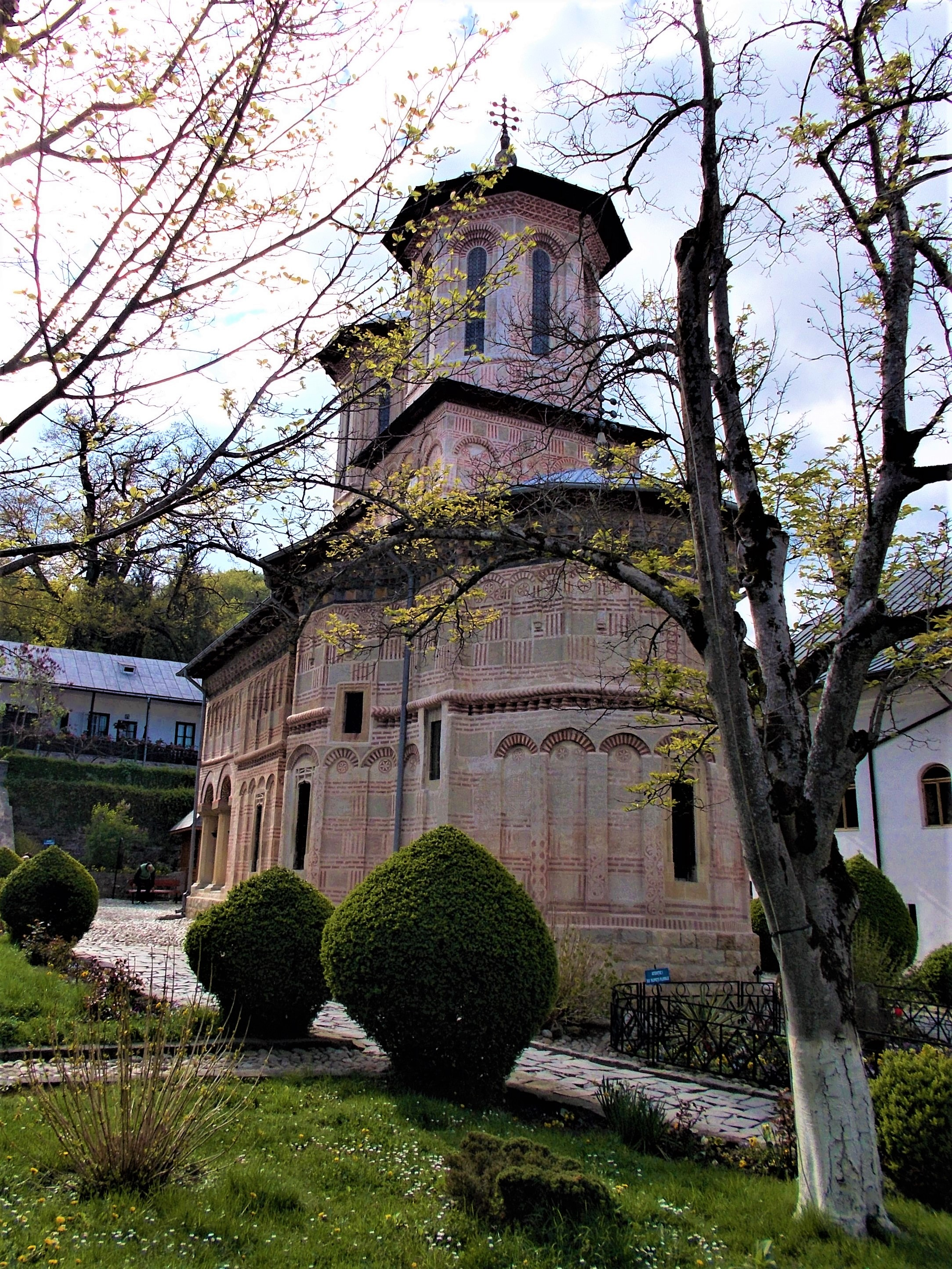 Biserica de piatră a mănăstirii ”Dintr-un Lemn”, județul Vâlcea 01